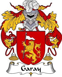 ESCUDO